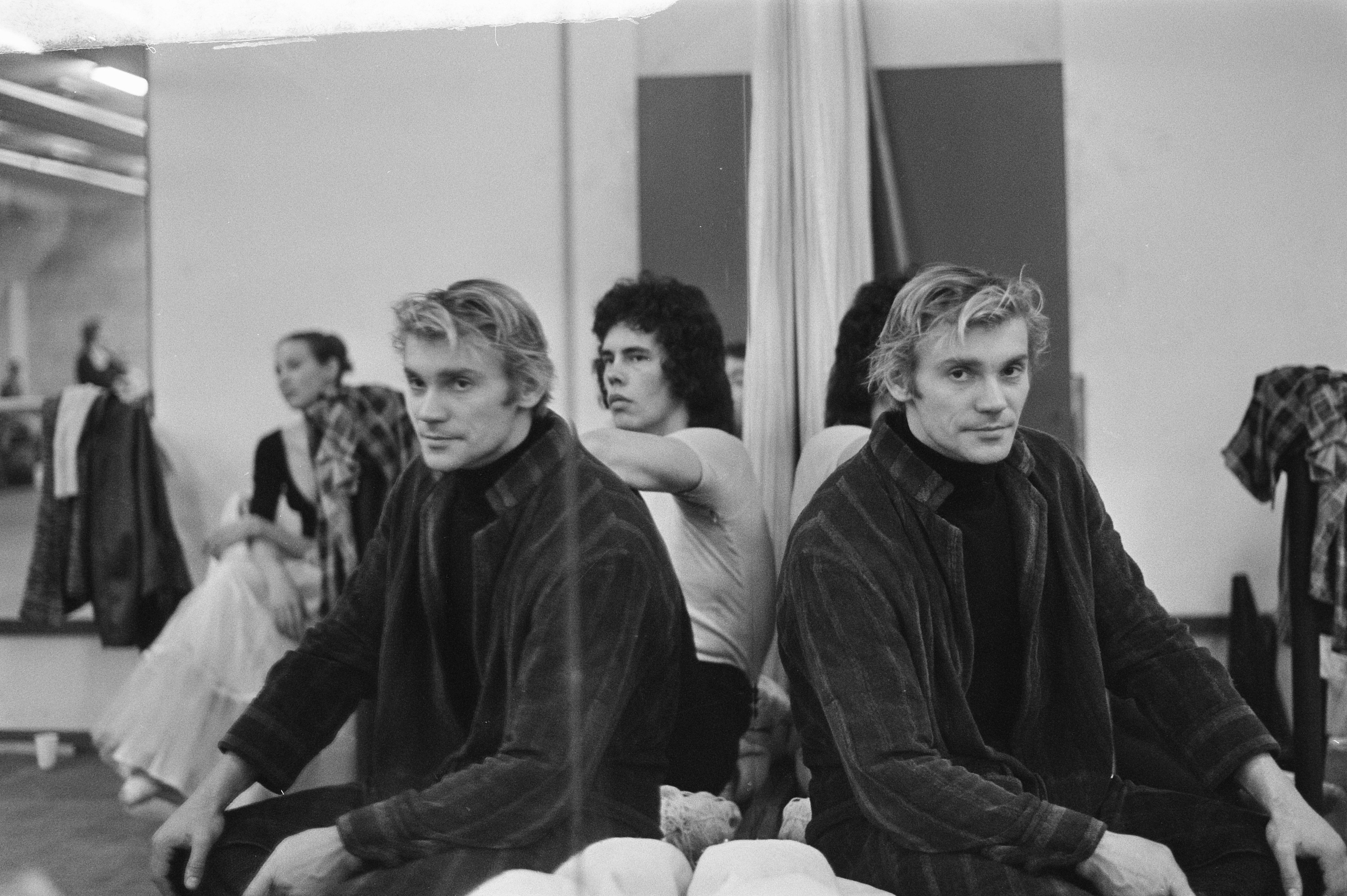 Collectie / Archief : Fotocollectie Anefo Reportage / Serie : [ onbekend ] Beschrijving : Rusissche danspaar Ekaterina Maximowa en Wladimir Wasiljew bij Nationaal Ballet tijdens repetitie Datum : 10 november 1972 Trefwoorden : BALLET, repetities Persoonsnaam : Ekaterina Maximowa Fotograaf : Peters, Hans / Anefo Auteursrechthebbende : Nationaal Archief Materiaalsoort : Negatief (zwart/wit) Nummer archiefinventaris : bekijk toegang 2.24.01.05 Bestanddeelnummer : 926-0146